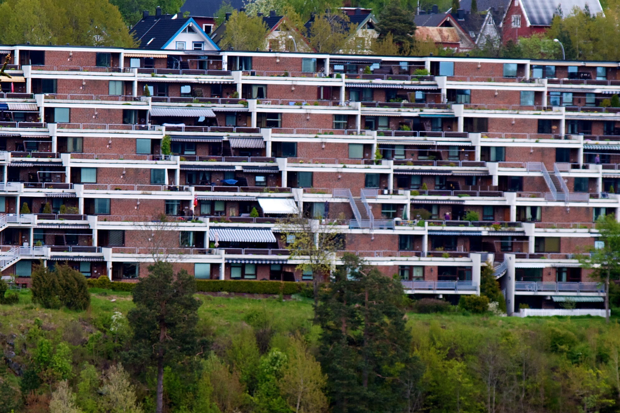 Oppsal terrasse sett fra Tallberget